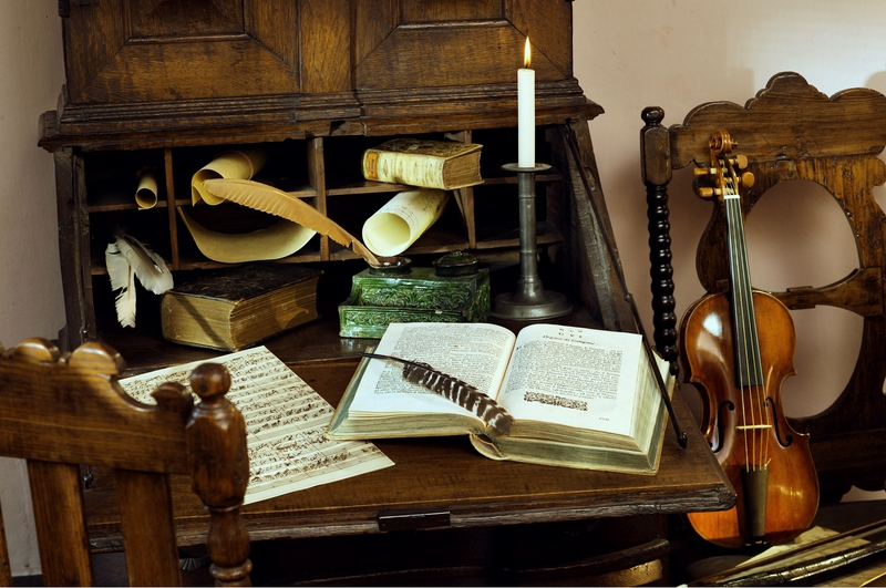 Bachhaus Eisenach, Componir-Stube, 2004